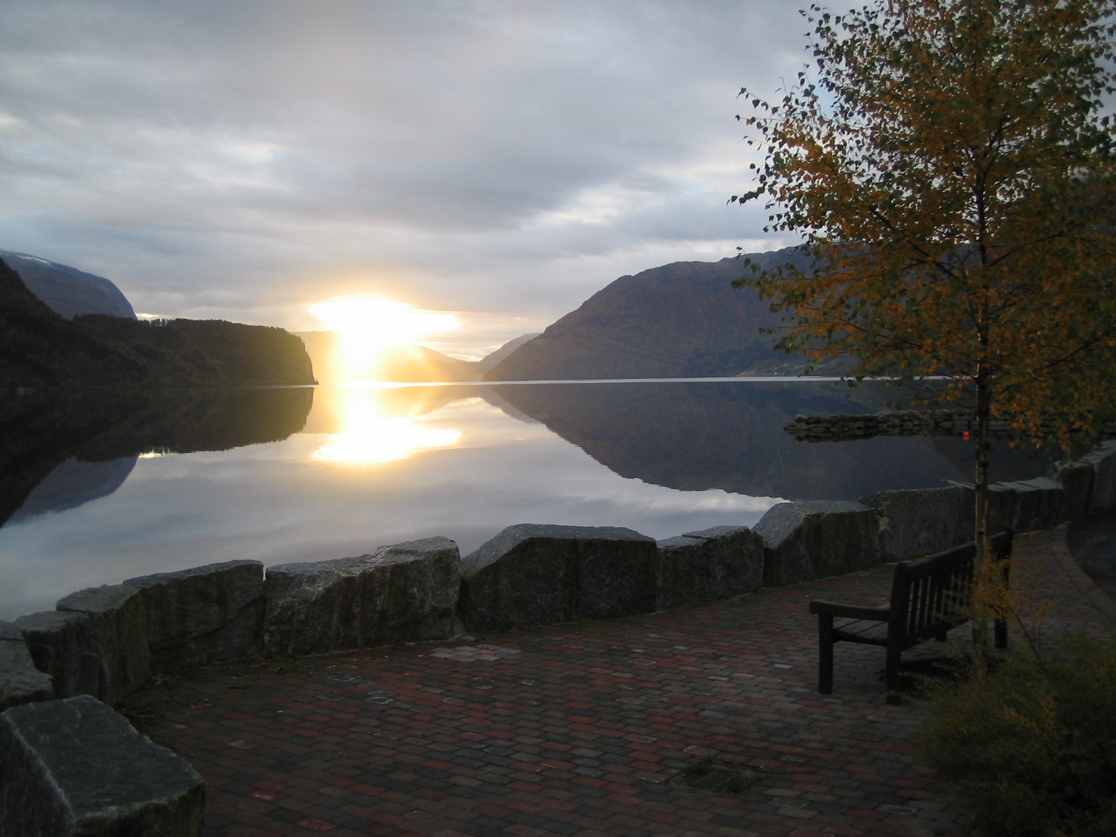 Hornindalsvatnet sett frå Grodås. Foto: André Gjørven